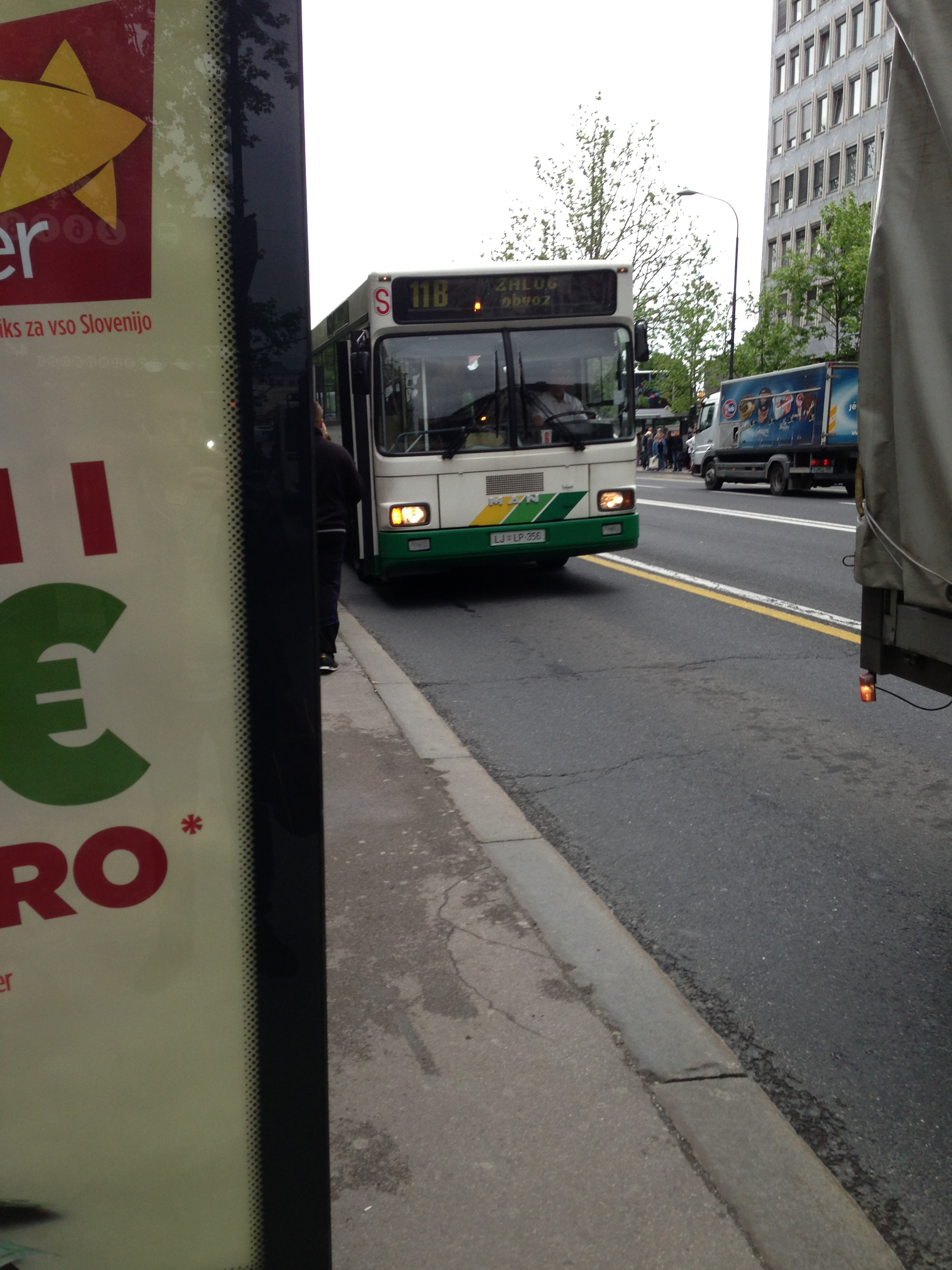 LPP avtobus 11B na Bavarskem dvoru.